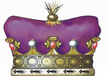 Korona brytyjskiego markiza. British Marquiscrown. Autor: Tomek Steifer, Gdansk, 2006